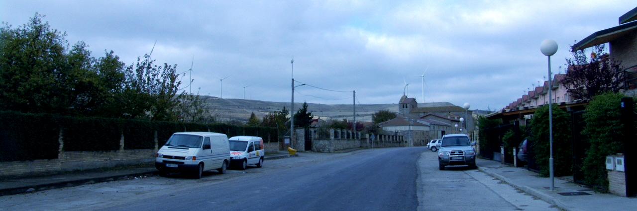 Impacto visual, parque eólico "Páramo", Arroyal, Alfoz de Quintanadueñas, Burgos, España.